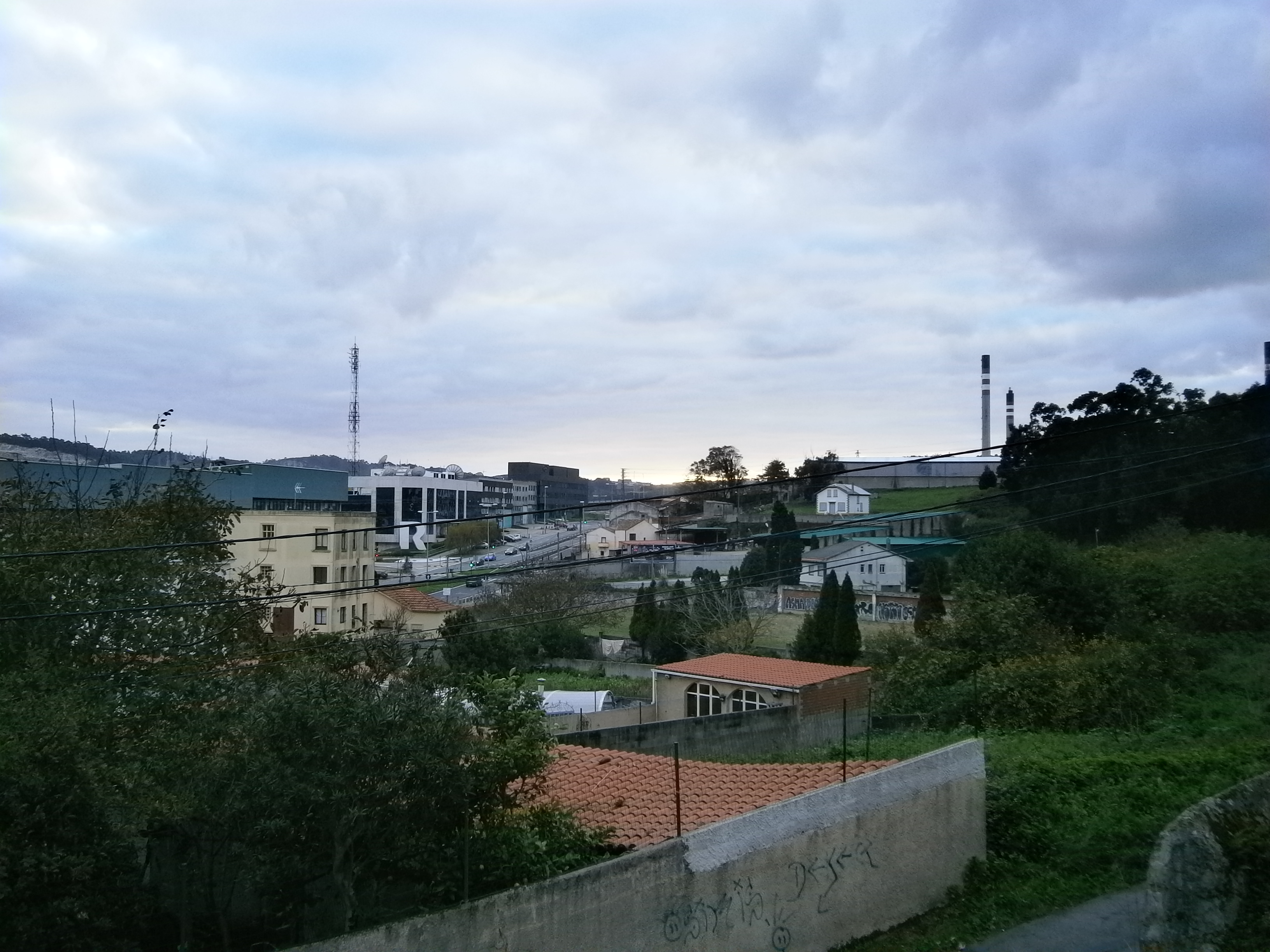 Vista de Fontenova, na Coruña